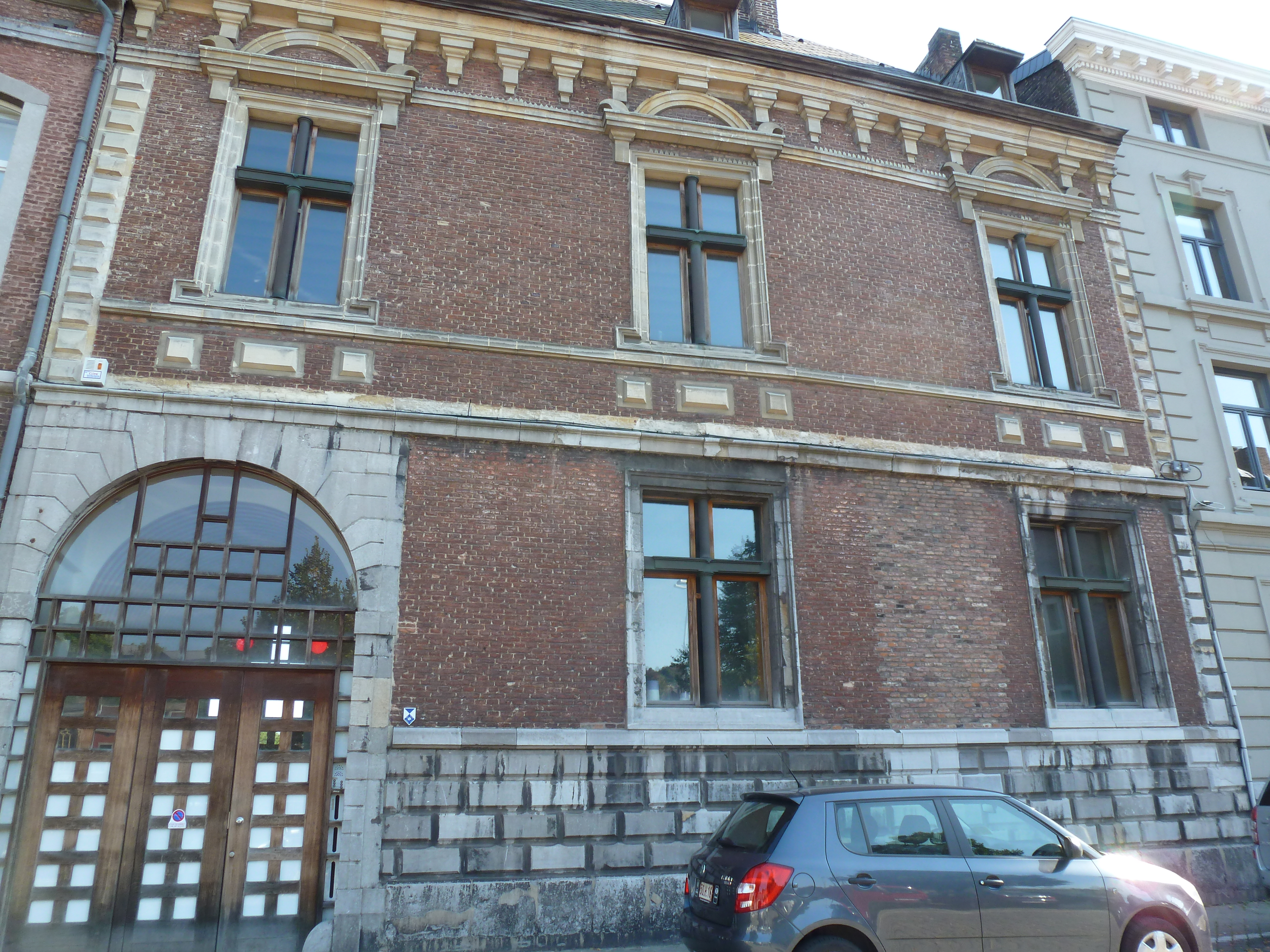 maison ancienne